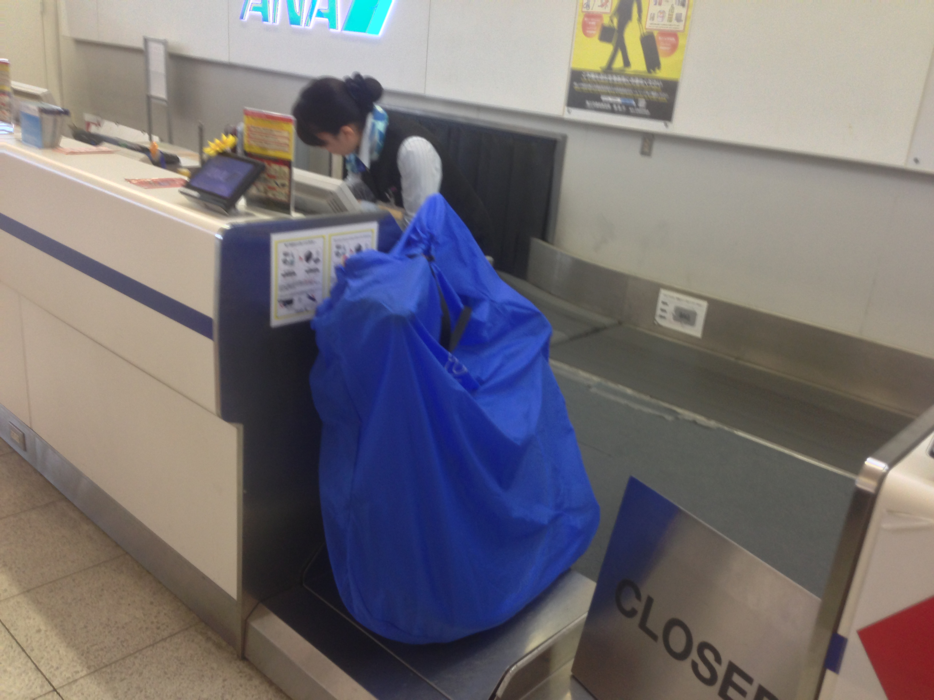 航空機のおける輪行